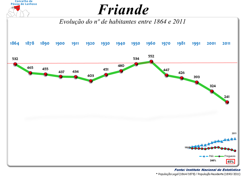 Censos 1864/2011